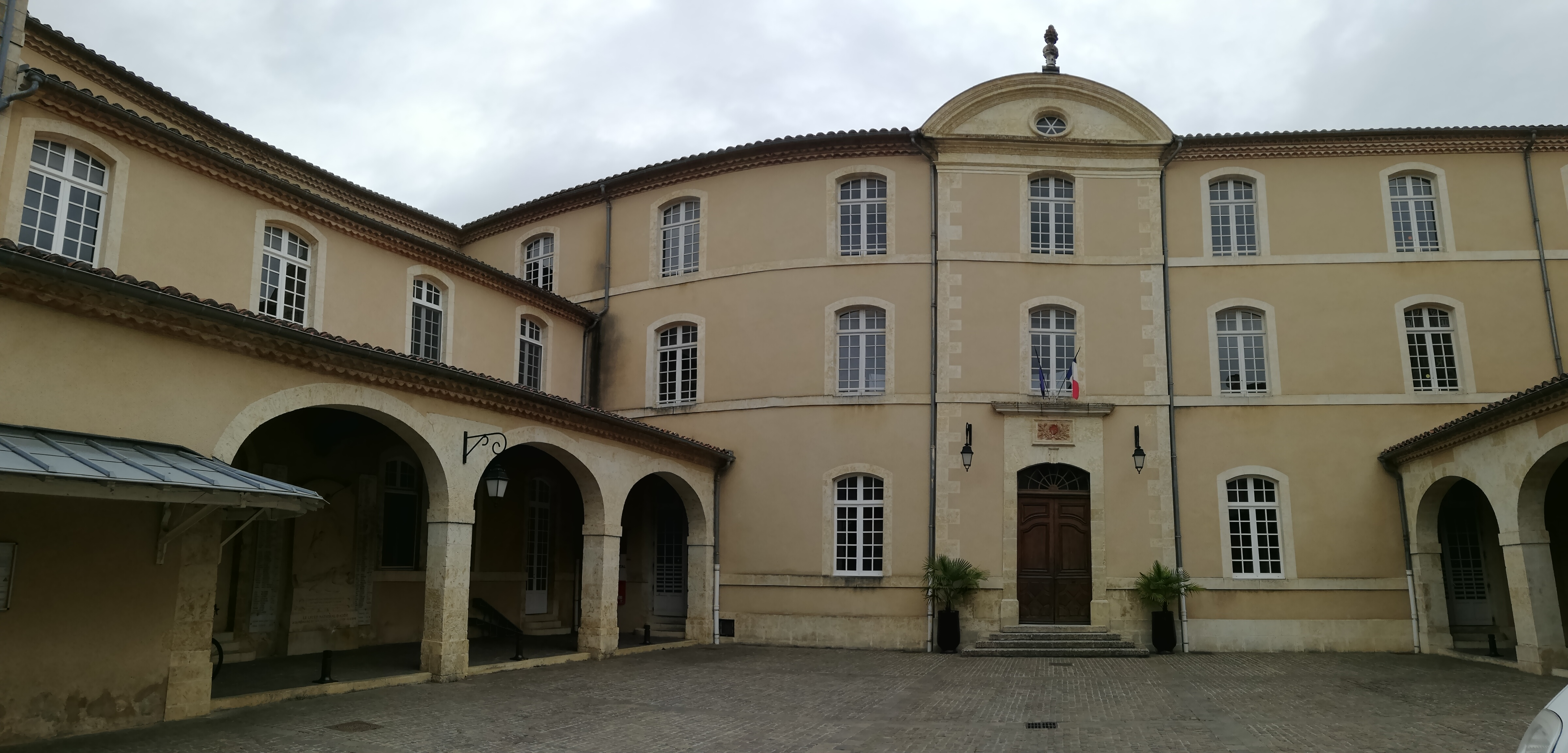 Cette photo nous montre le devant du Collège Salinis